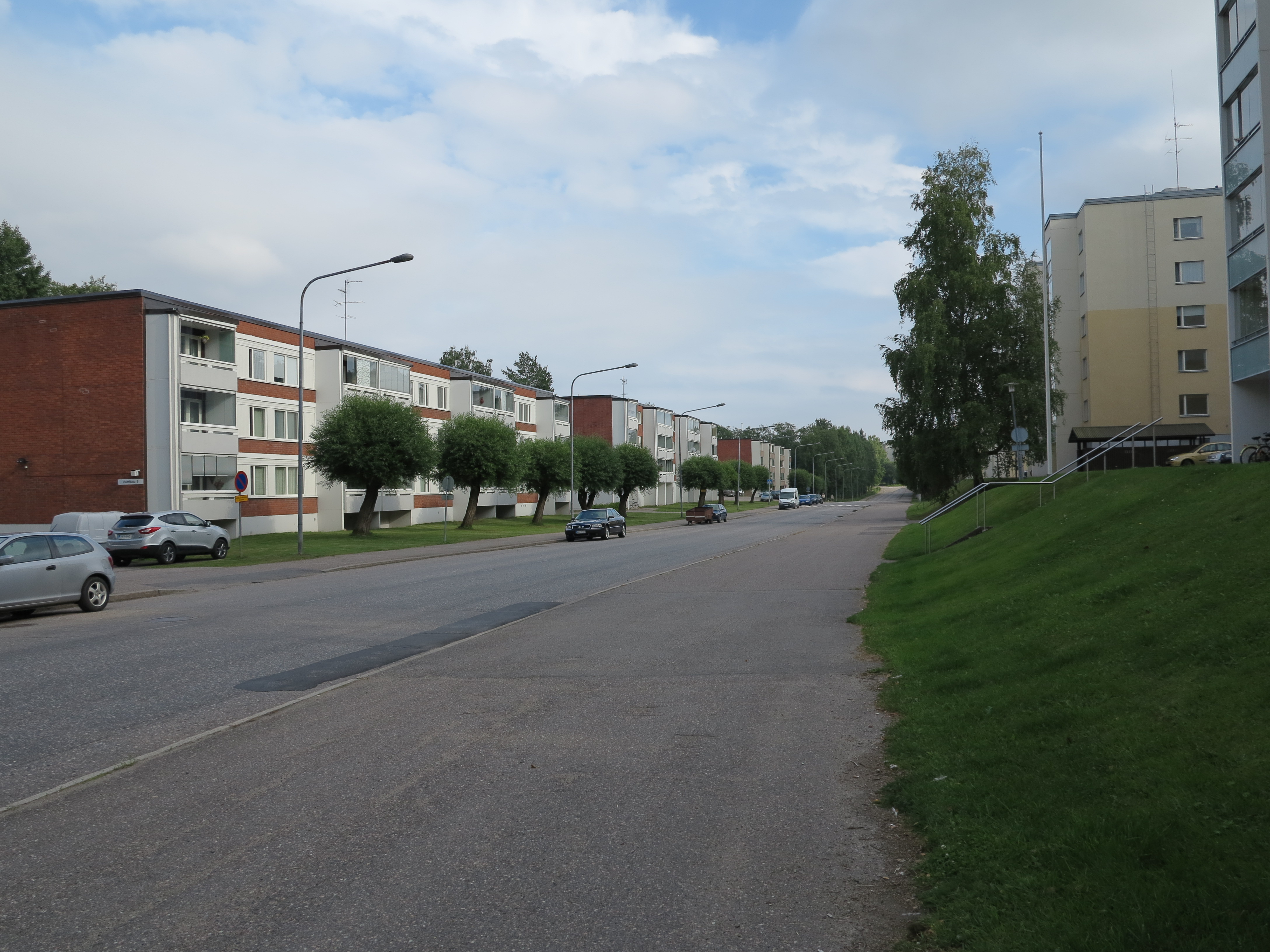 Kerrostaloja Vuorikadulla